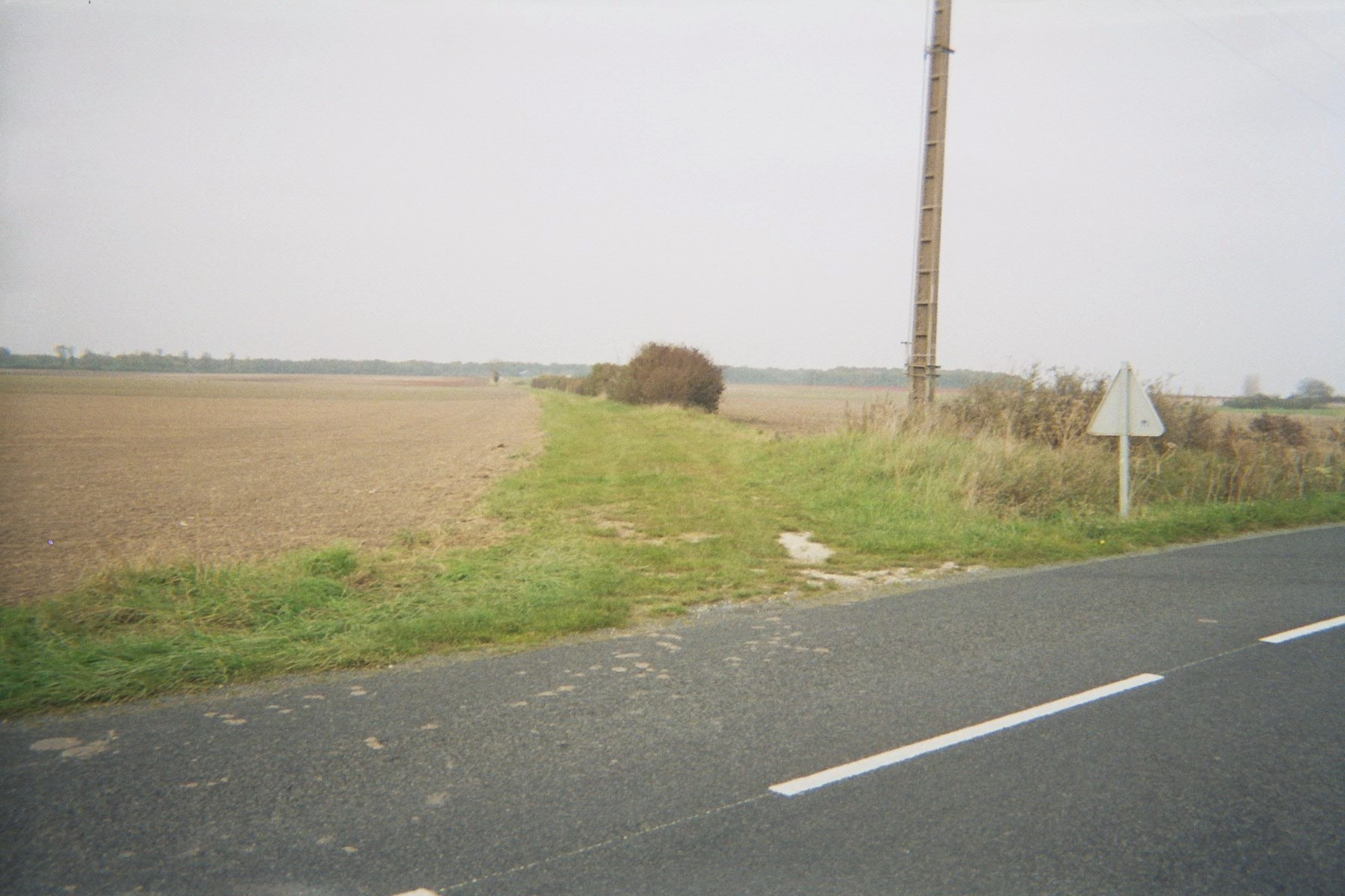 Voie antique dite "le Chemin d'Espagne" à Cigogné